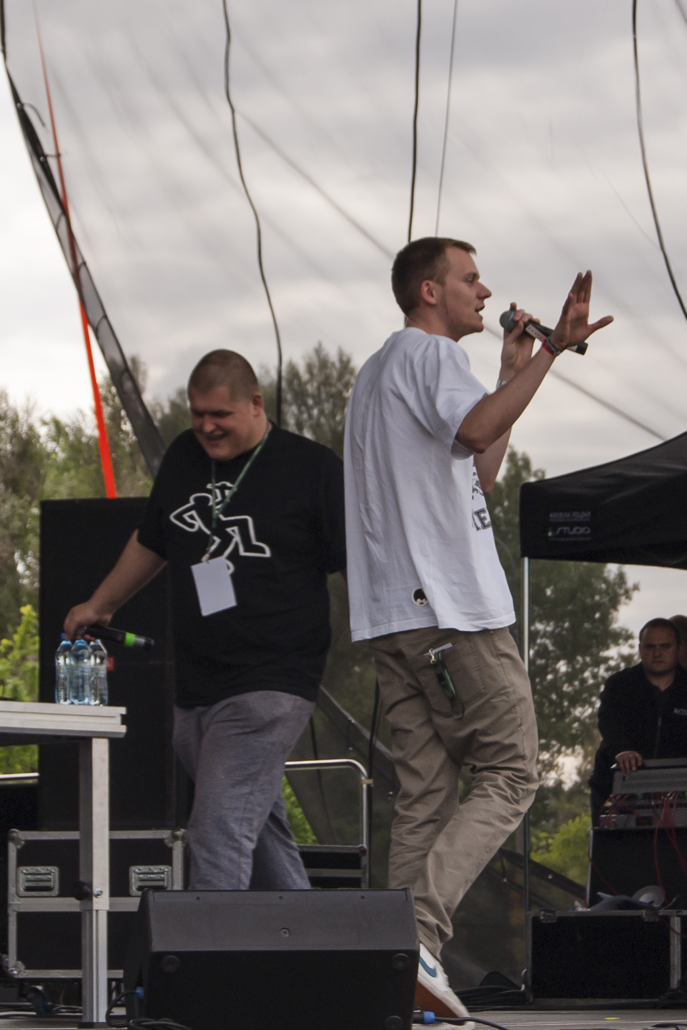 Raper Buka na festiwalu Ursynalia 2014